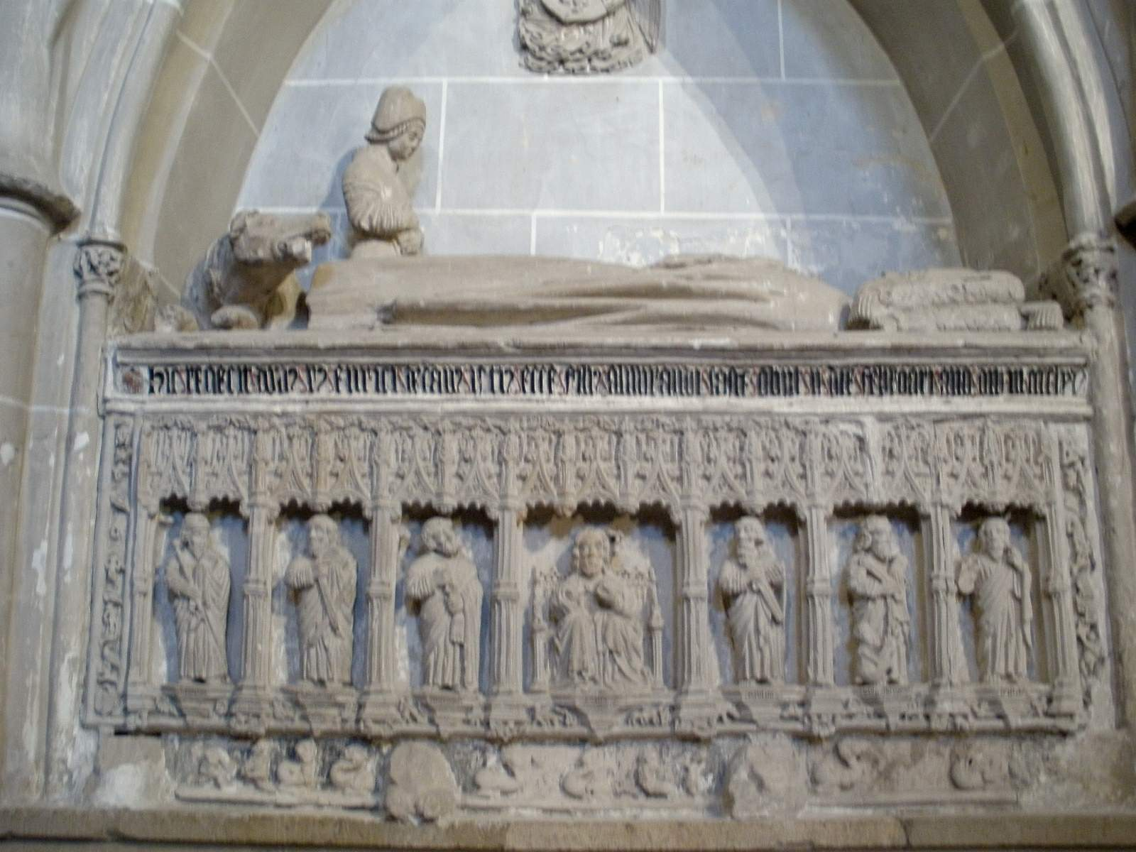 Sepulcro del arcediano Rodrigo Enríquez, fallecido en 1465 e hijo del almirante de Castilla Alonso Enríquez y bisnieto del rey Alfonso XI de Castilla. Fue realizado por el entallador Alonso de Portillo en el siglo XV y está colocado en el primer tramo del lado del Evangelio de la parte exterior de la capilla mayor de la catedral de Palencia, provincia de Palencia, (España).